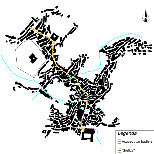 San Giovanni in Fiore - sviluppo centro storico, pianta generale